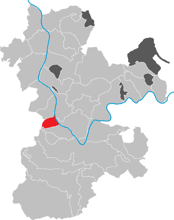 Karte von Laudenbach im Kreis Miltenberg, Bayern, Deutschland.